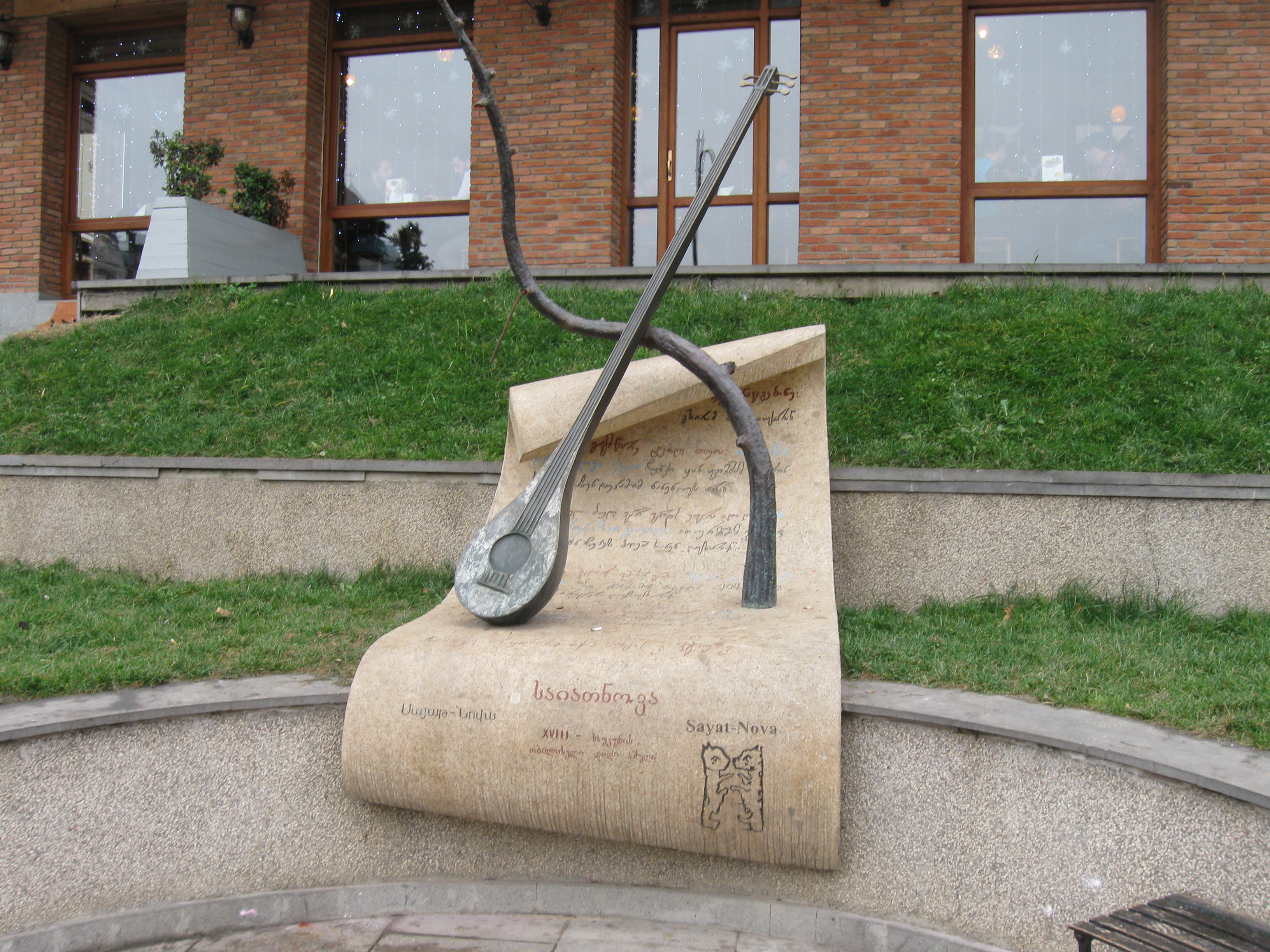 Սայաթ-Նովայի հուշարձանը